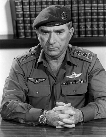 הרמטכ"ל רא"ל רפאל איתן.